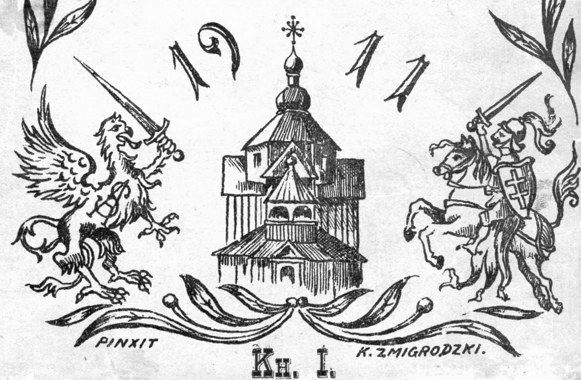 Беларуская (тарашкевіца): Віцебск (Viciebsk), Пескавацік (Pieskavacik): вуліца Траецкая (vulica Trajeckaja). Царква Сьвятой Тройцы (Чорная)